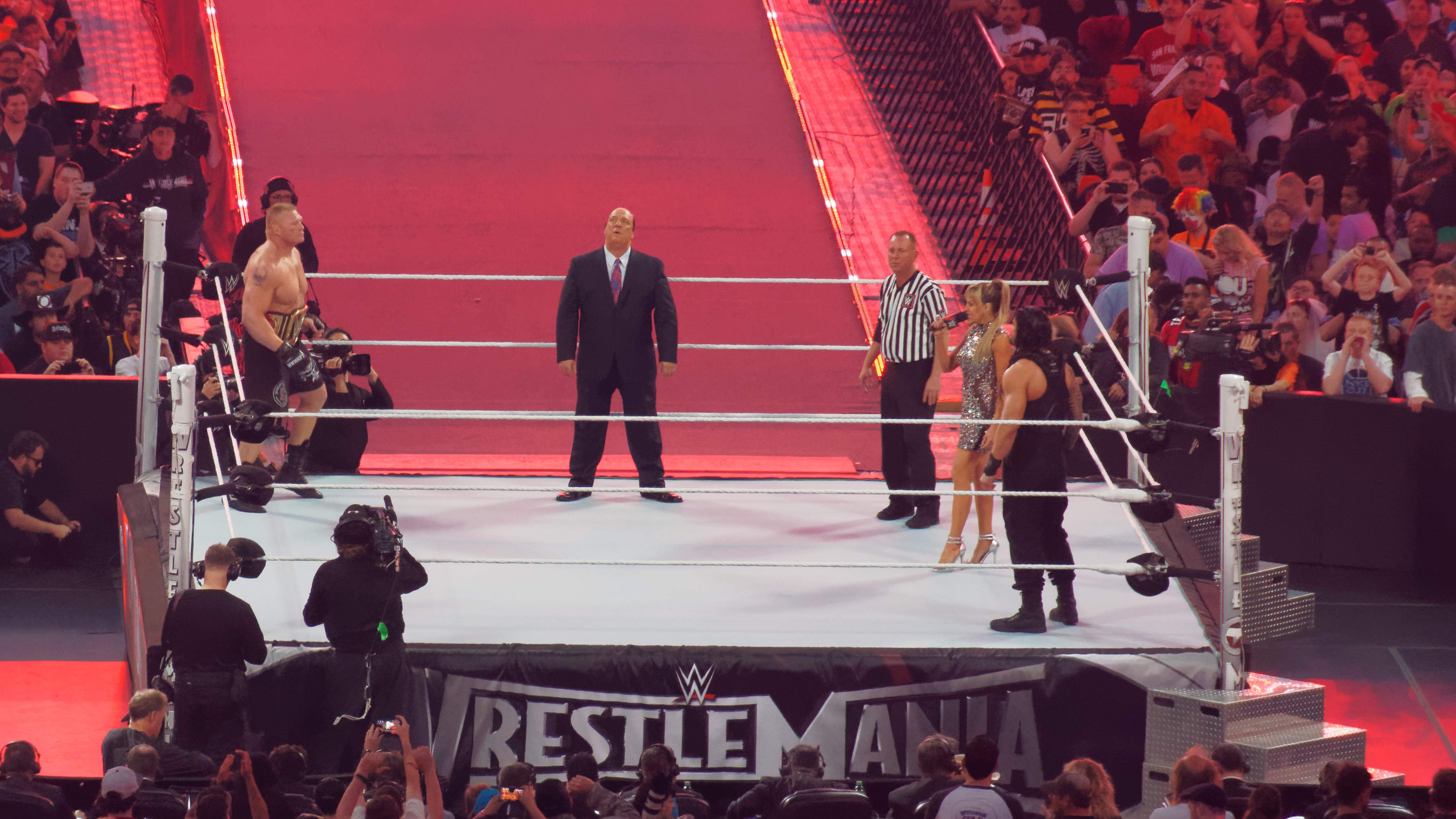 2015-03-29_19-38-54_ILCE-6000_9637_DxO